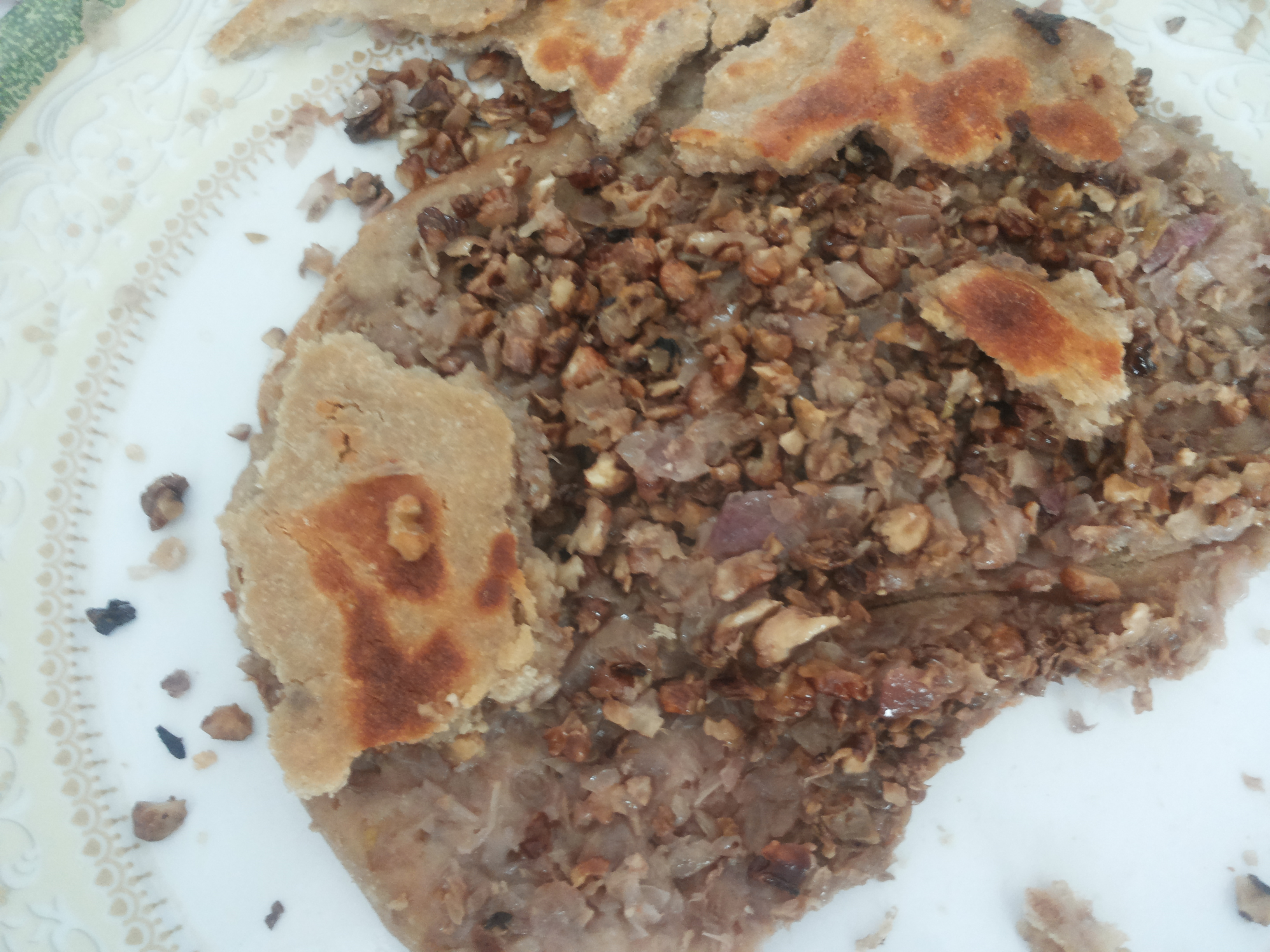 کوردیی ناوەندی: وێنەیەک لە خەروا کە گوێز و پیازەکە لە توێی هەویرەکەدا دیارە.